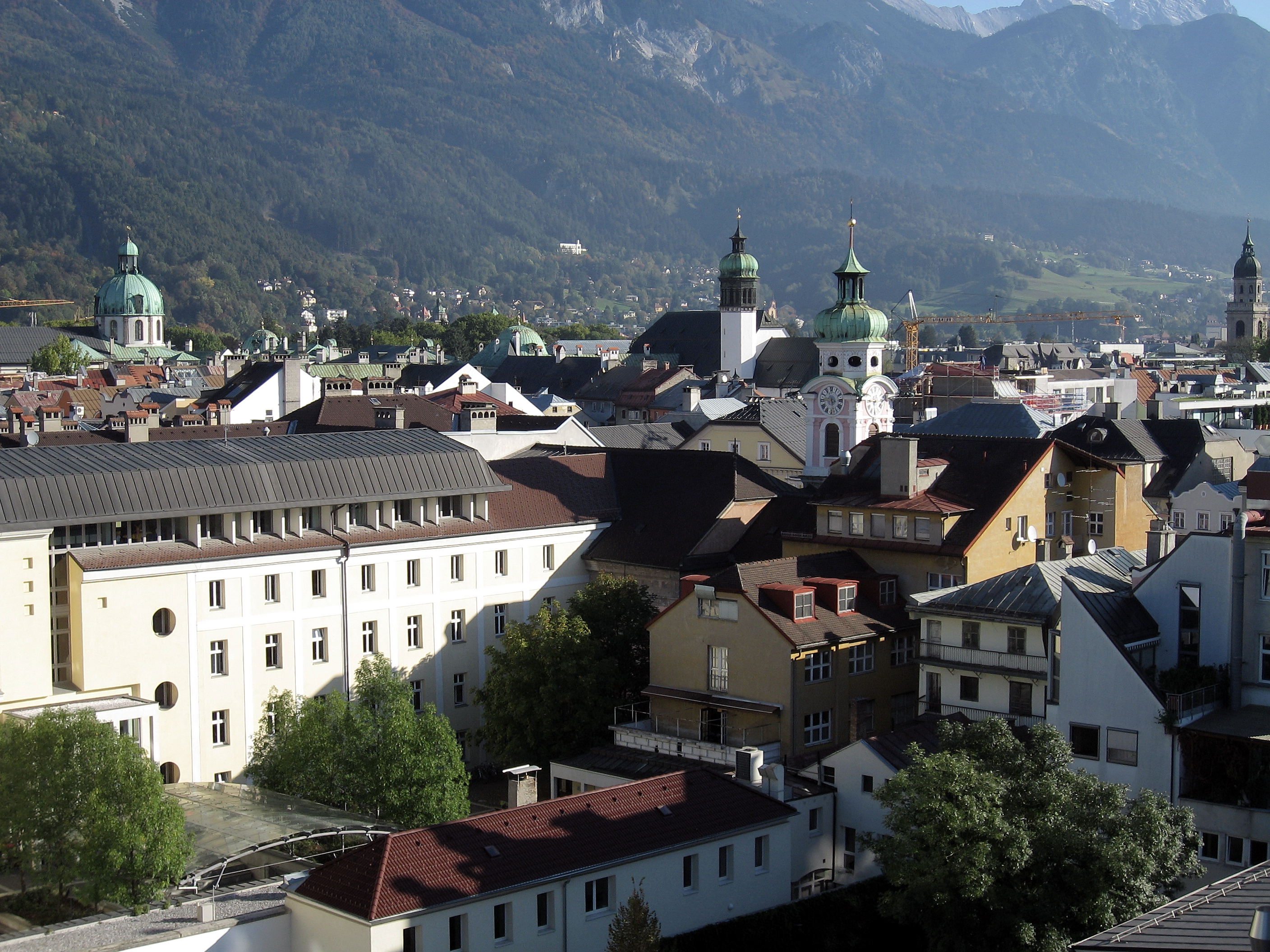 Österreich, Innsbruck, Blick über die Innenstadt vom Dach der Rathausarkaden vor dem Hintergrund der Nordkette